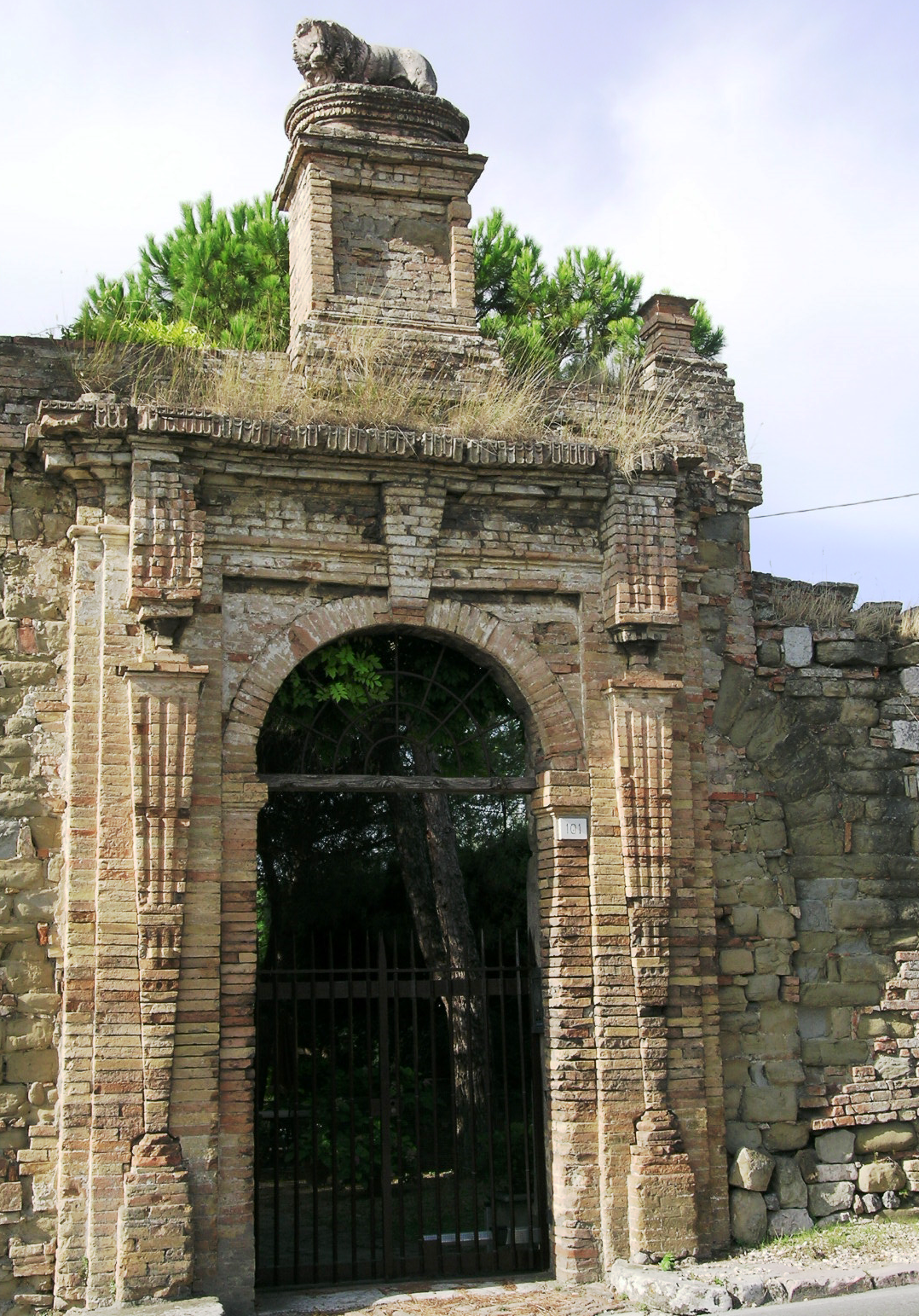 Portale del Leone di Galeazzo Alessi, Perugia